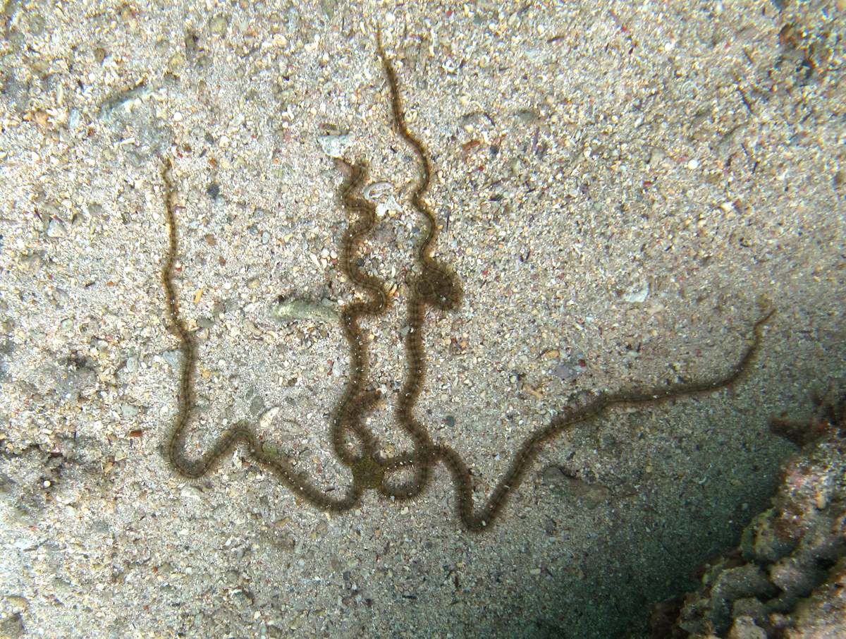 Une ophiure Macrophiothrix sp. à la Réunion.